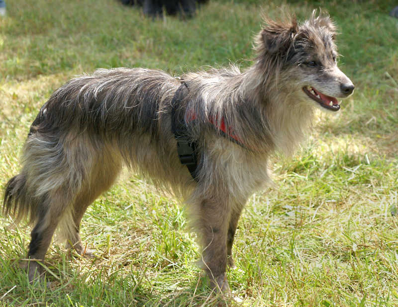 Berger des Pyrénées: Elina du Haut des Monts Foto selbst erstellt